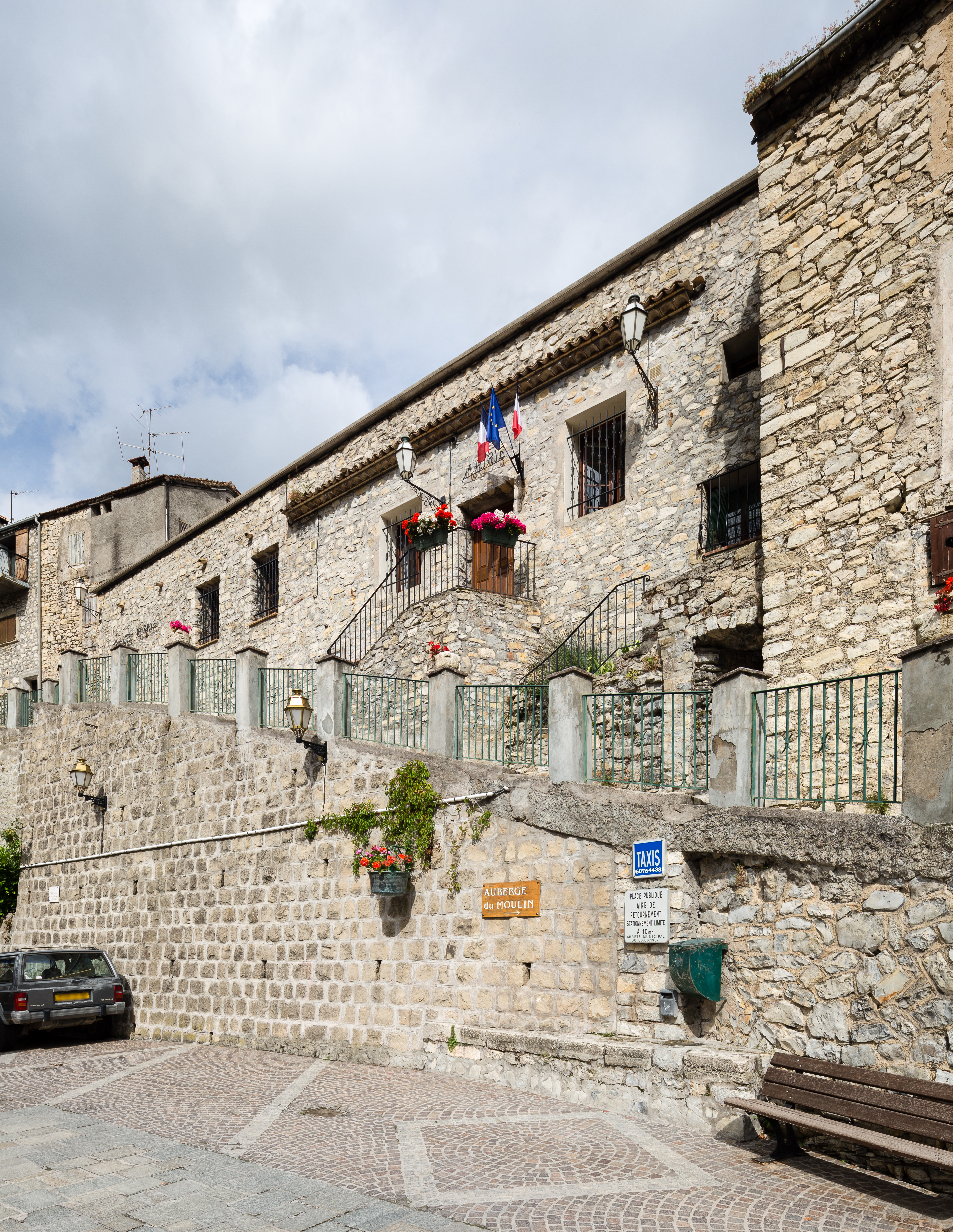 Mairie de Bairols (France).